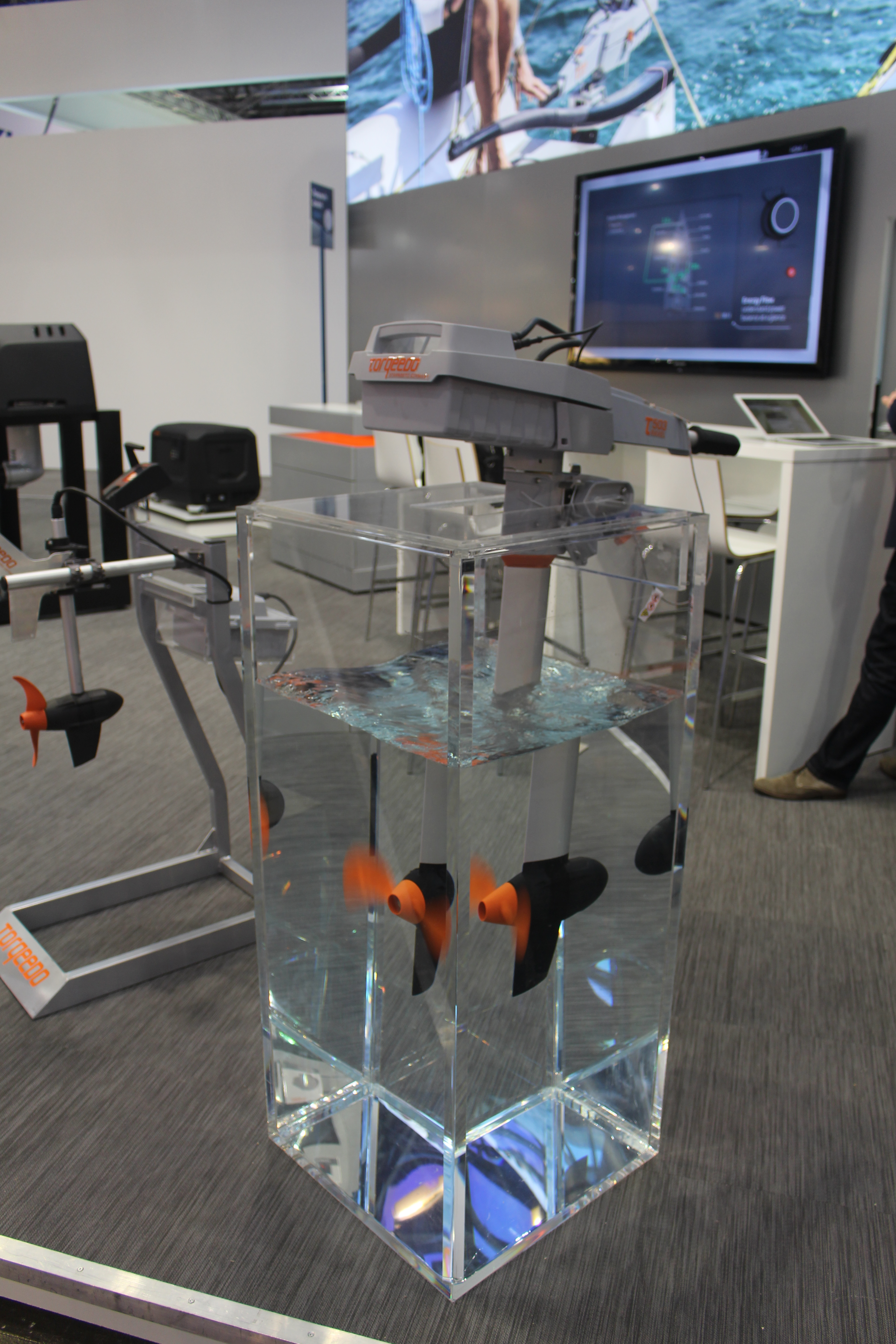 Motor Modell TRAVEL für Segelboot und Beiboote, 3 PS Äquivalent